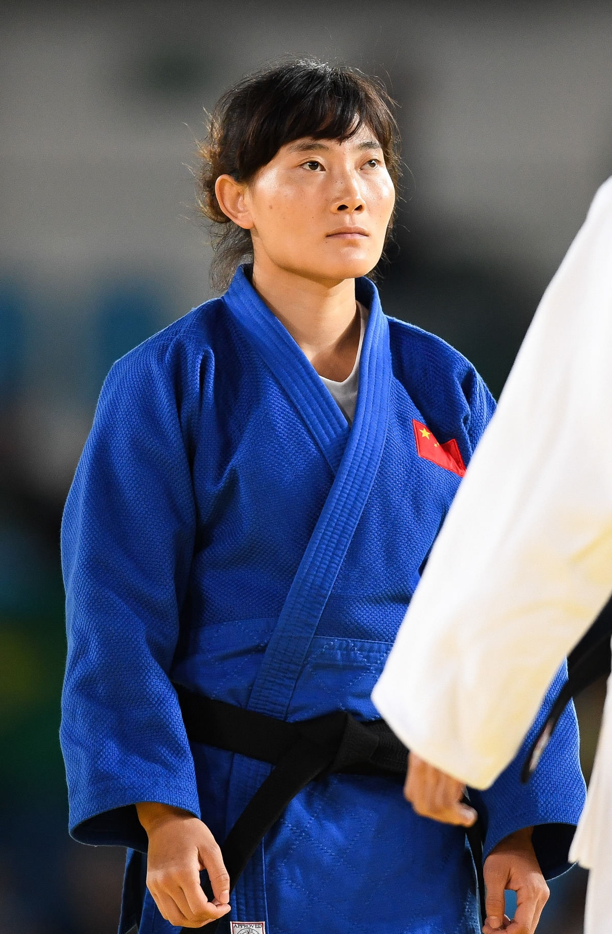 Wang Lijing na final do judô feminino 57kg e fica com a medalha de prata na Paralímpiada Rio 2016 (Tânia Rêgo/Agência Brasil)